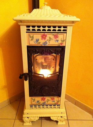 Kachle na pelety Cornelia